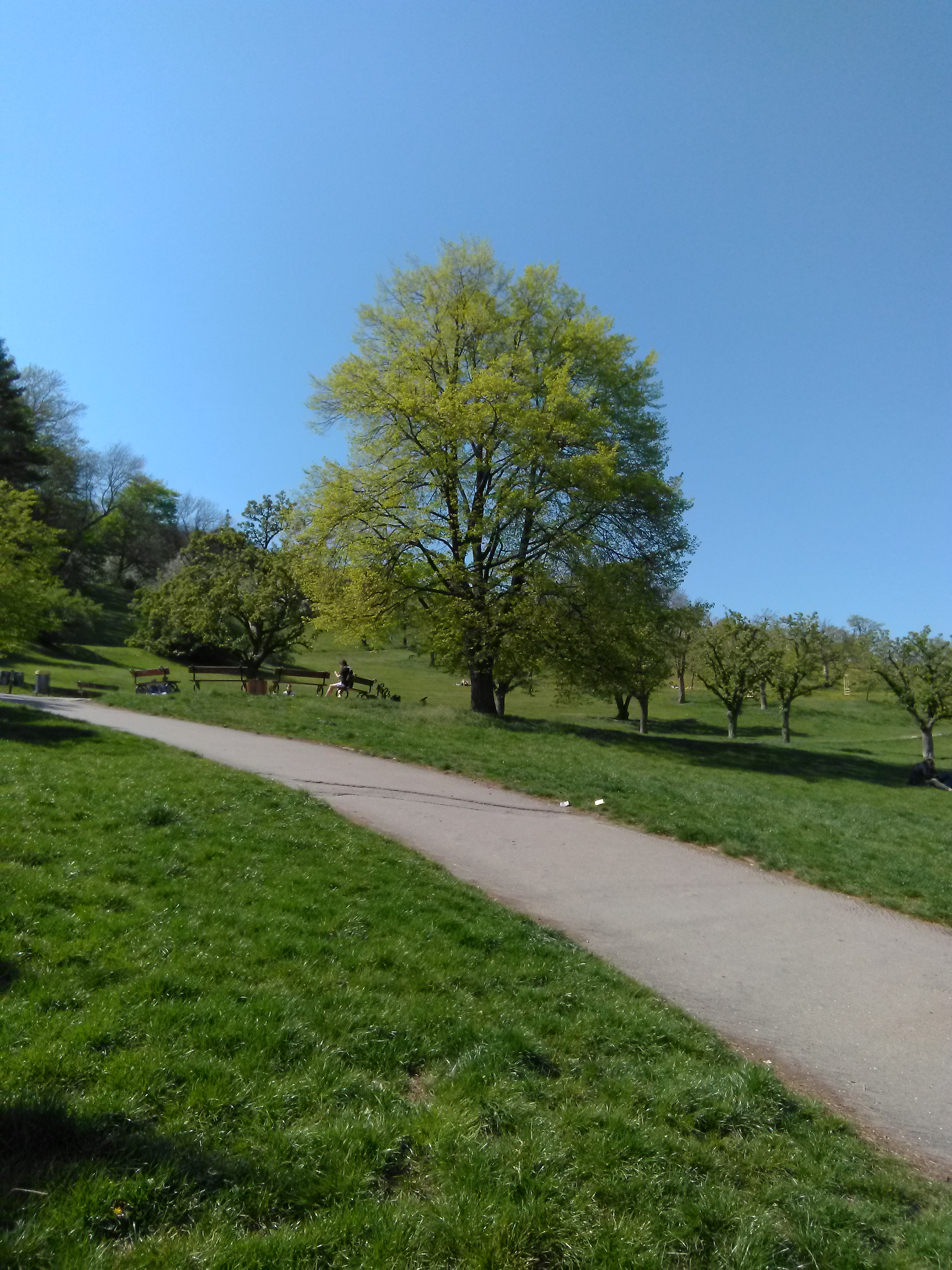 Lípa malolistá (Tilia cordata). Praha 1 - Malá Strana, Seminářská zahrada. Vysazena 28. října 1968. Významný strom, evidenční číslo MHMP: 31, v databázi od roku 2014.